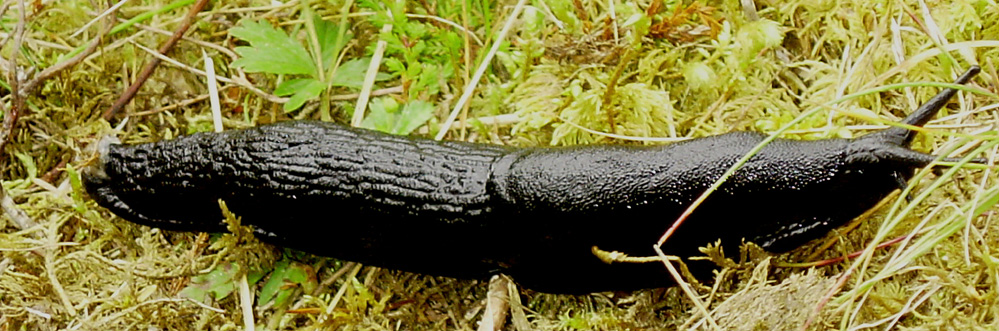 Arion ater (Norway:Svart skogsnegl)